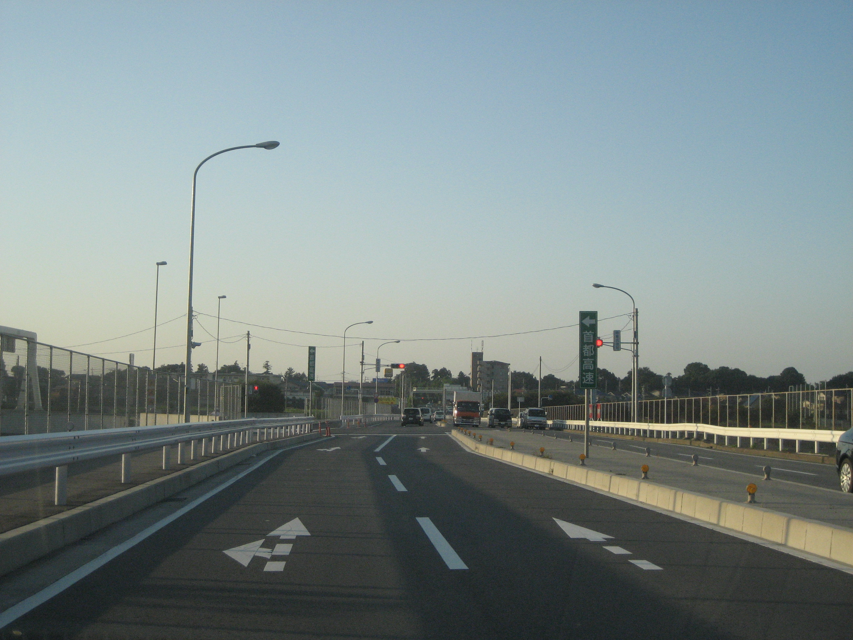 埼玉県道1号線首都高速さいたま見沼入口付近